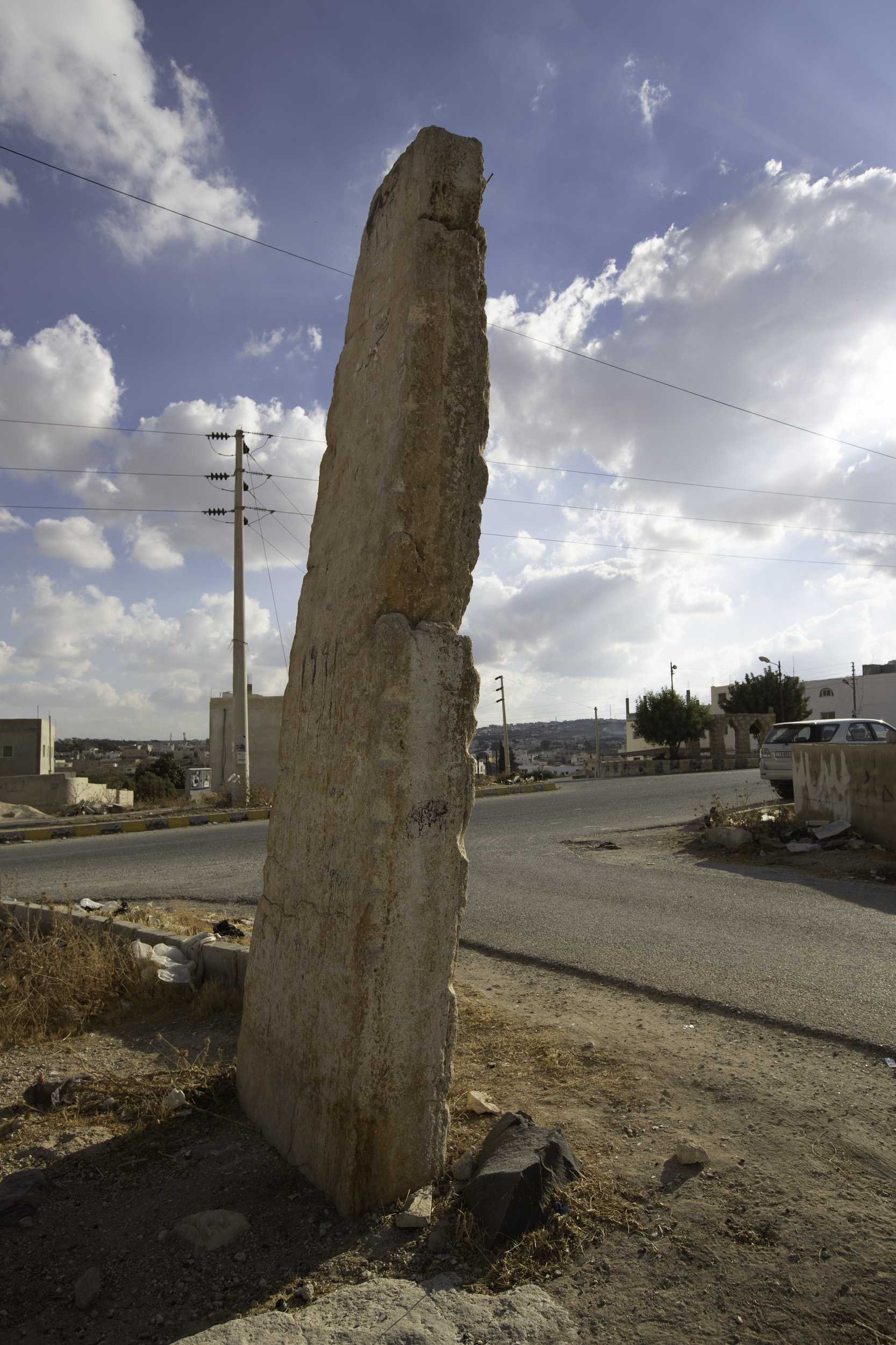 Ader (Karak)